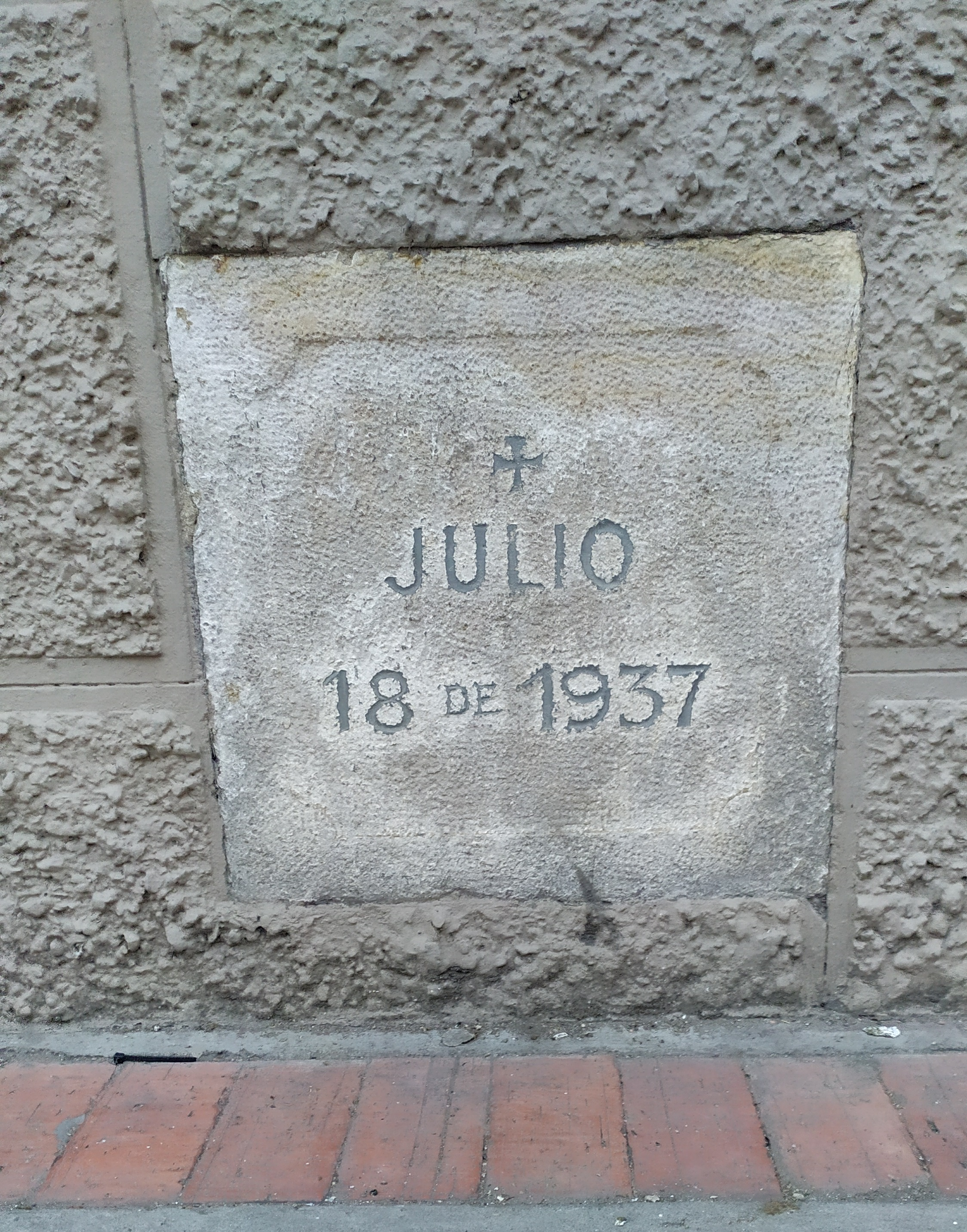 placa hecha durante la construcción de la iglesia principal de mosquera